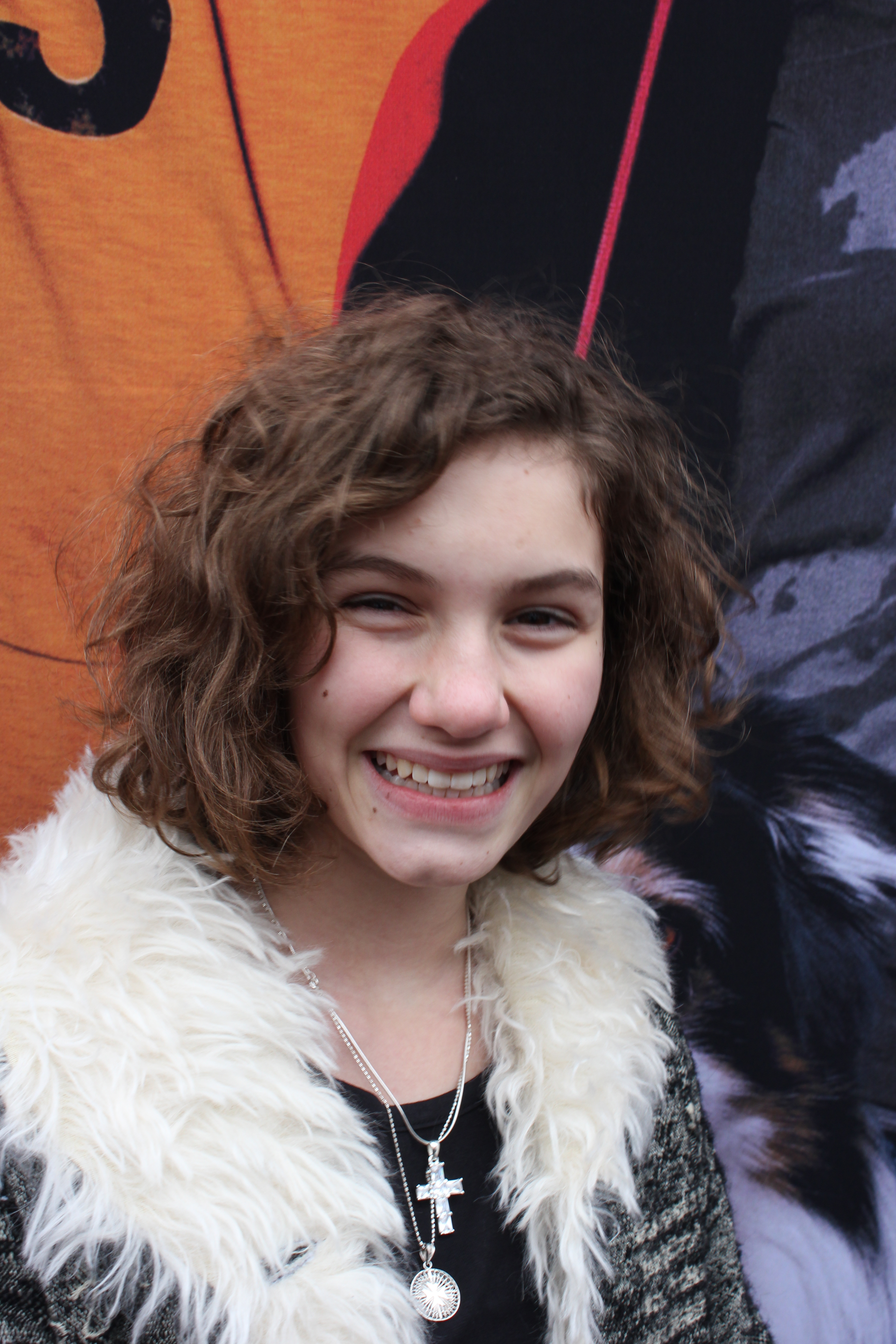 Portrait-Aufnahme von Valeria Eisenbart bei der Schleswigpremiere des Fünf Freunde Films (28. Januar 2012).